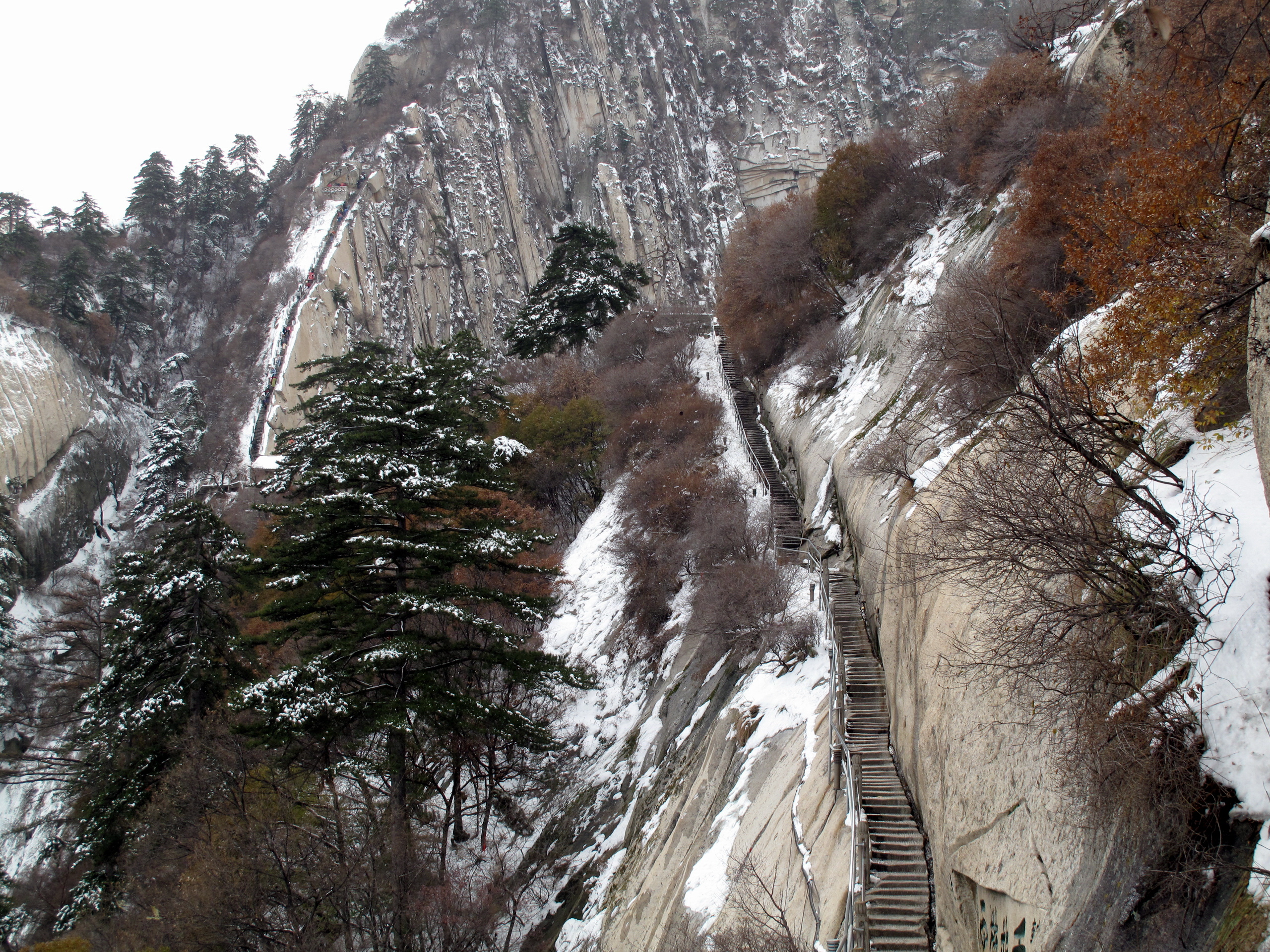 华山，眺望苍龙岭。